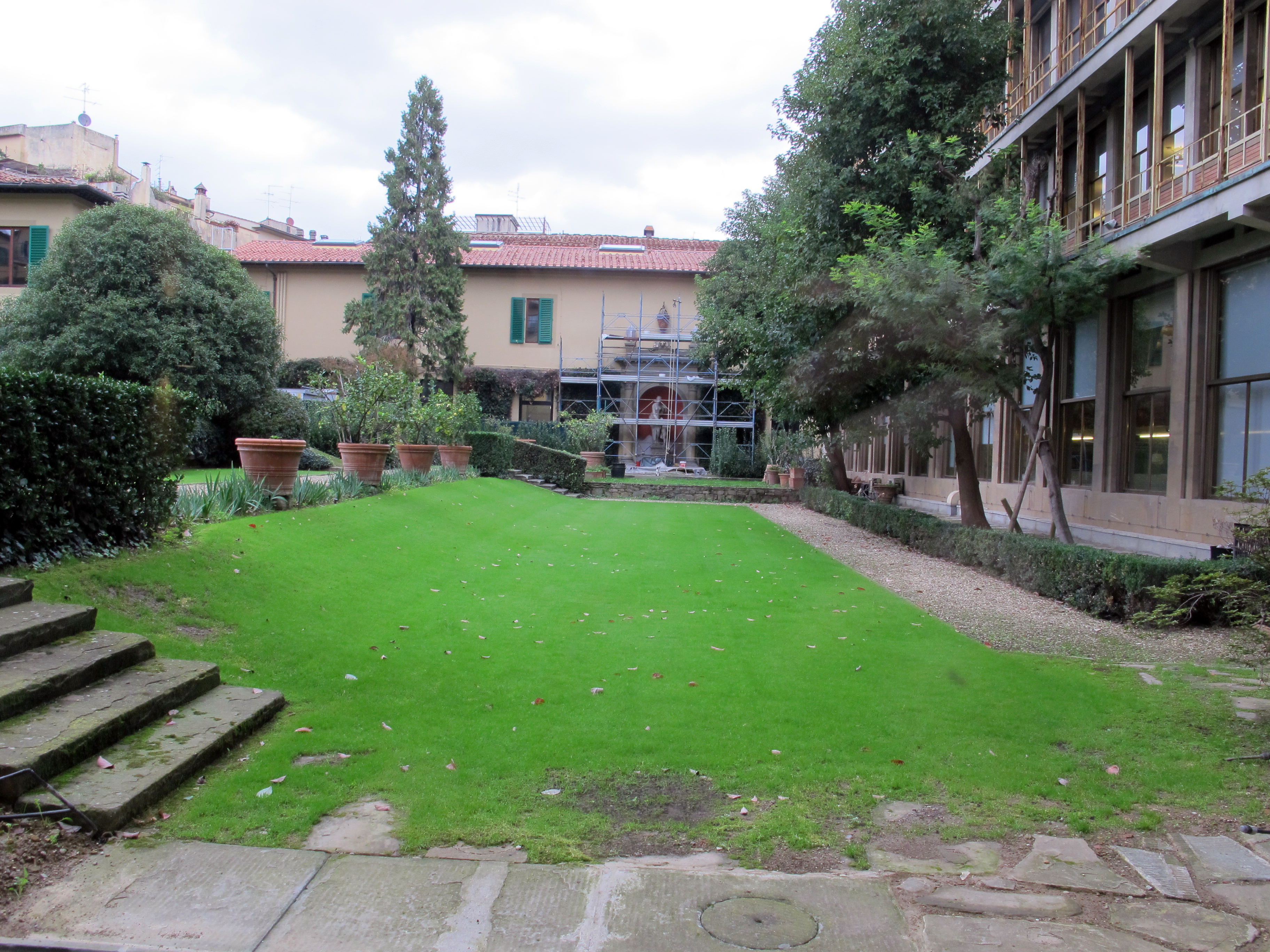 Palazzo della Cassa di Risparmio, Firenze